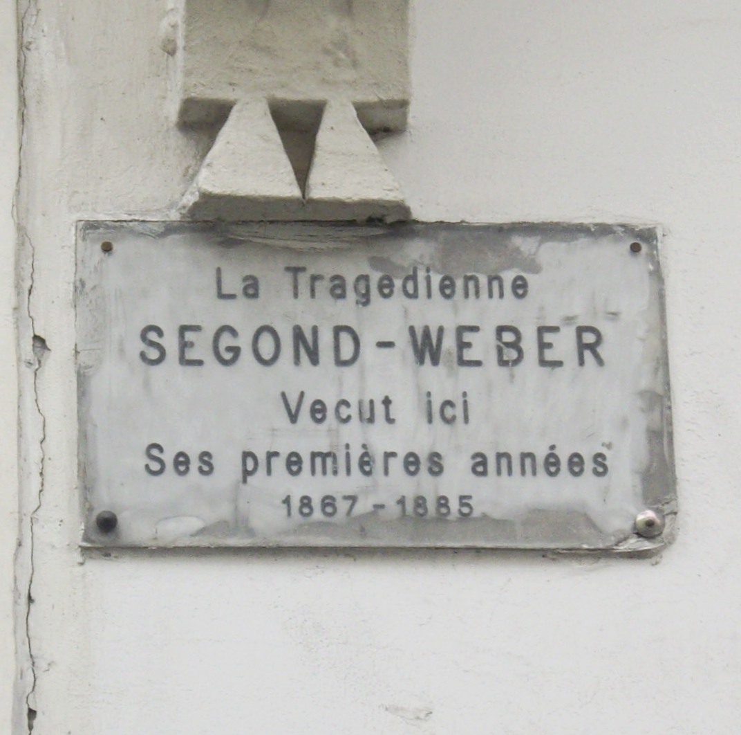 Plaque apposée au n° 43-45 de la rue de la Roquette, Paris 11e, où la tragédienne Caroline Eugénie Segond-Weber (1867-1945) vécut ses premières années de 1867 à 1885.